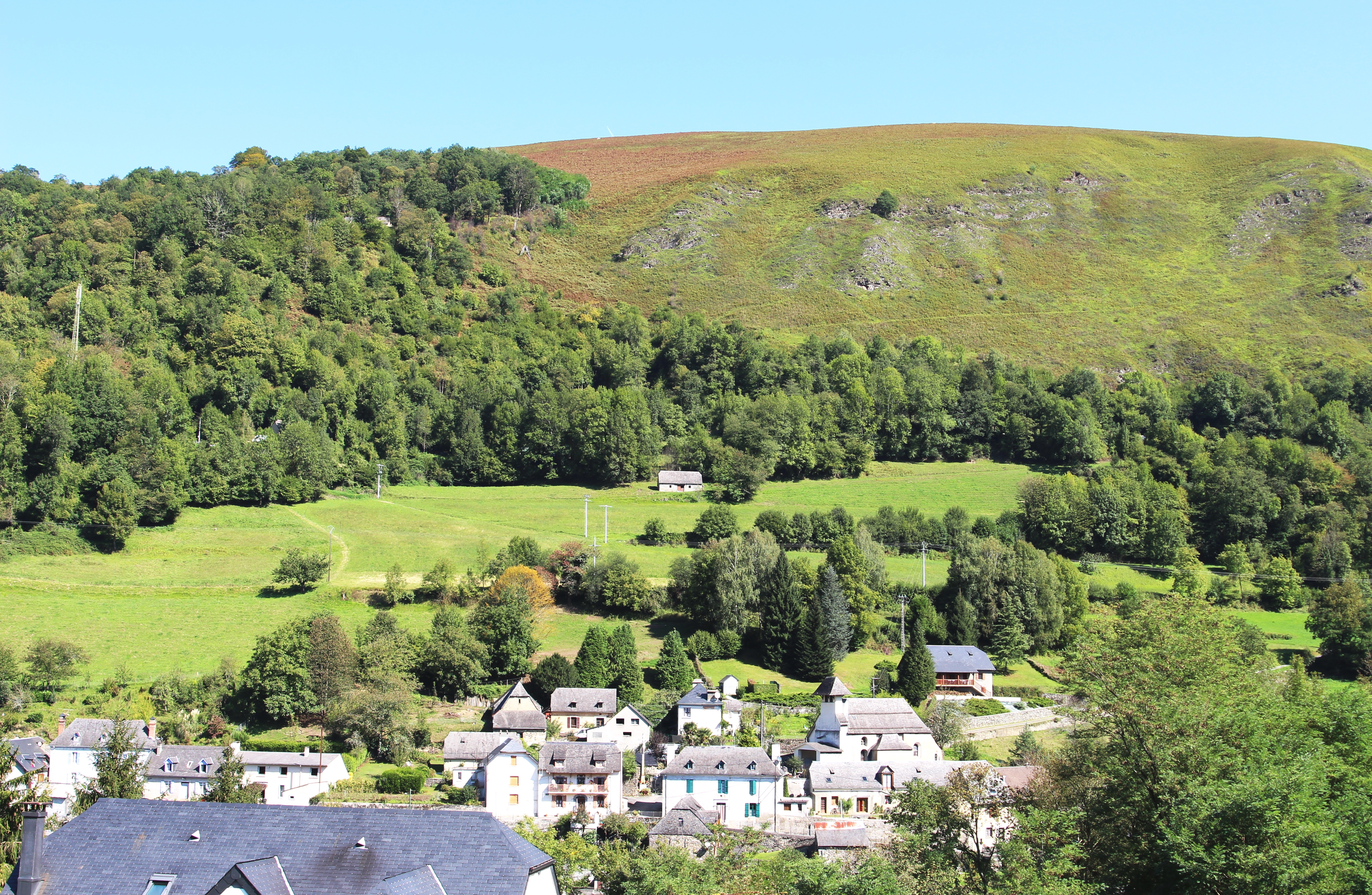 Juncalas (Hautes-Pyrénées)